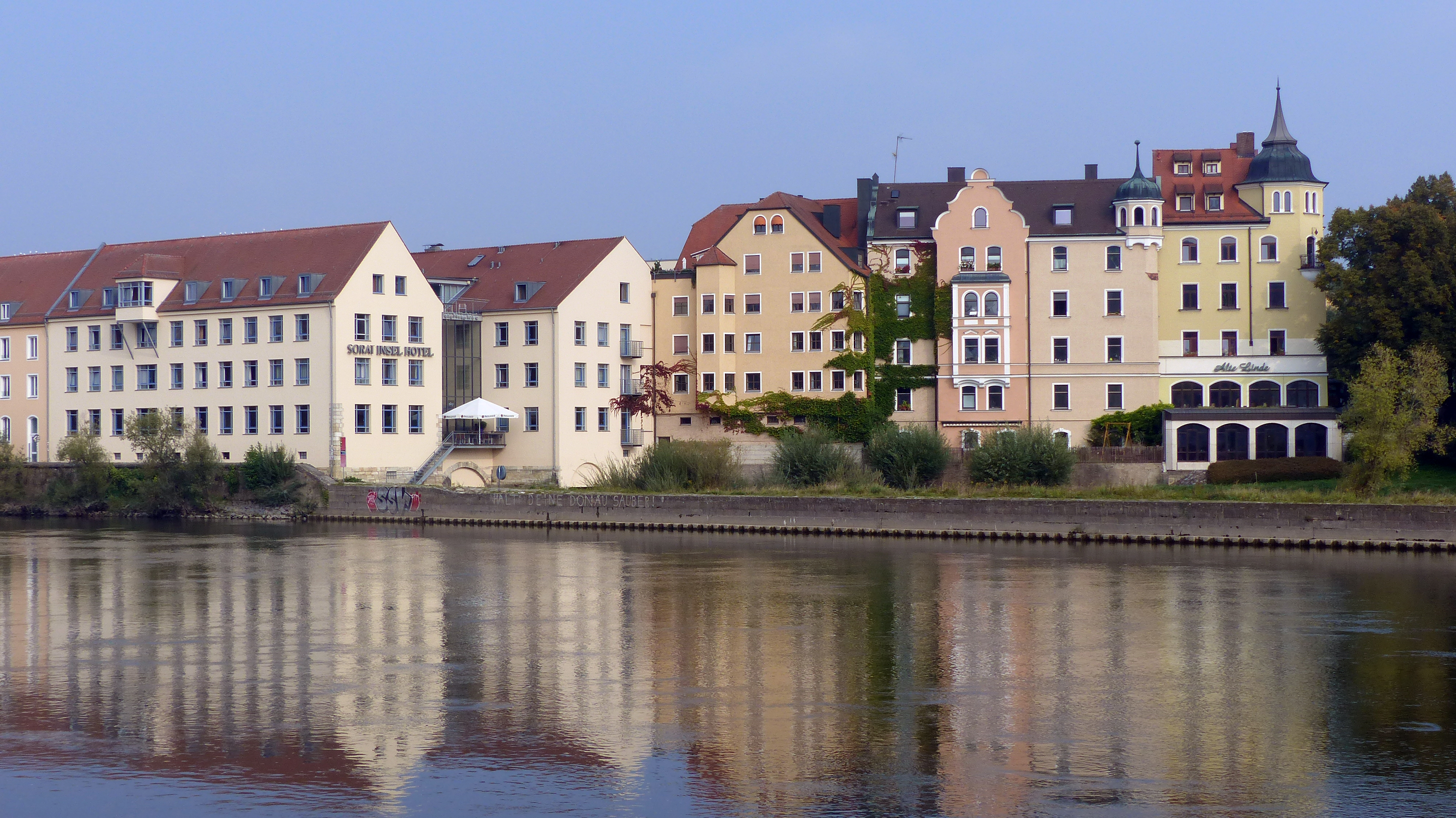 Denkmalgeschützte Gebäude auf der Insel WöhrdeThis is a photograph of an architectural monument.